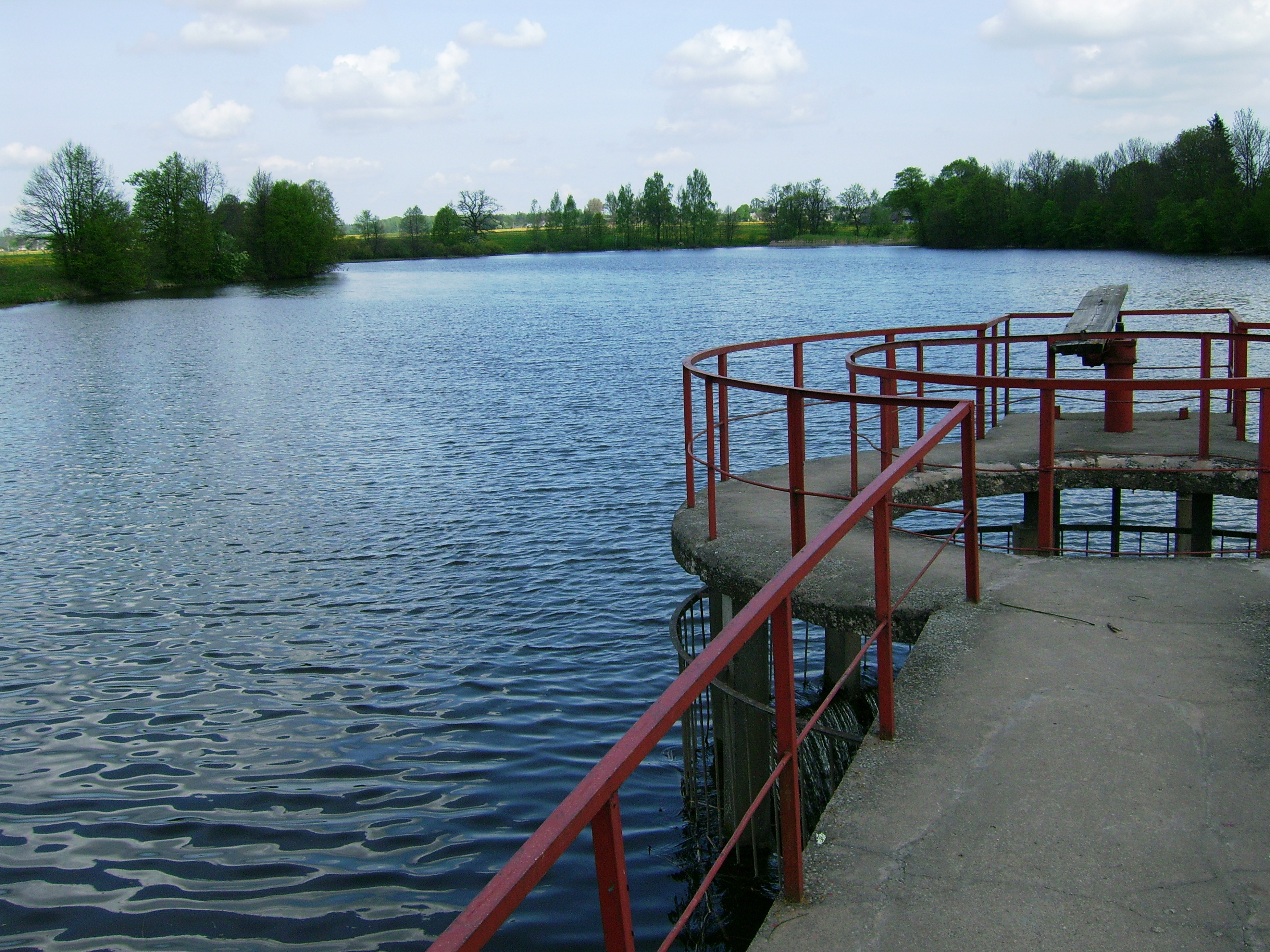 Lomių tvenkinys